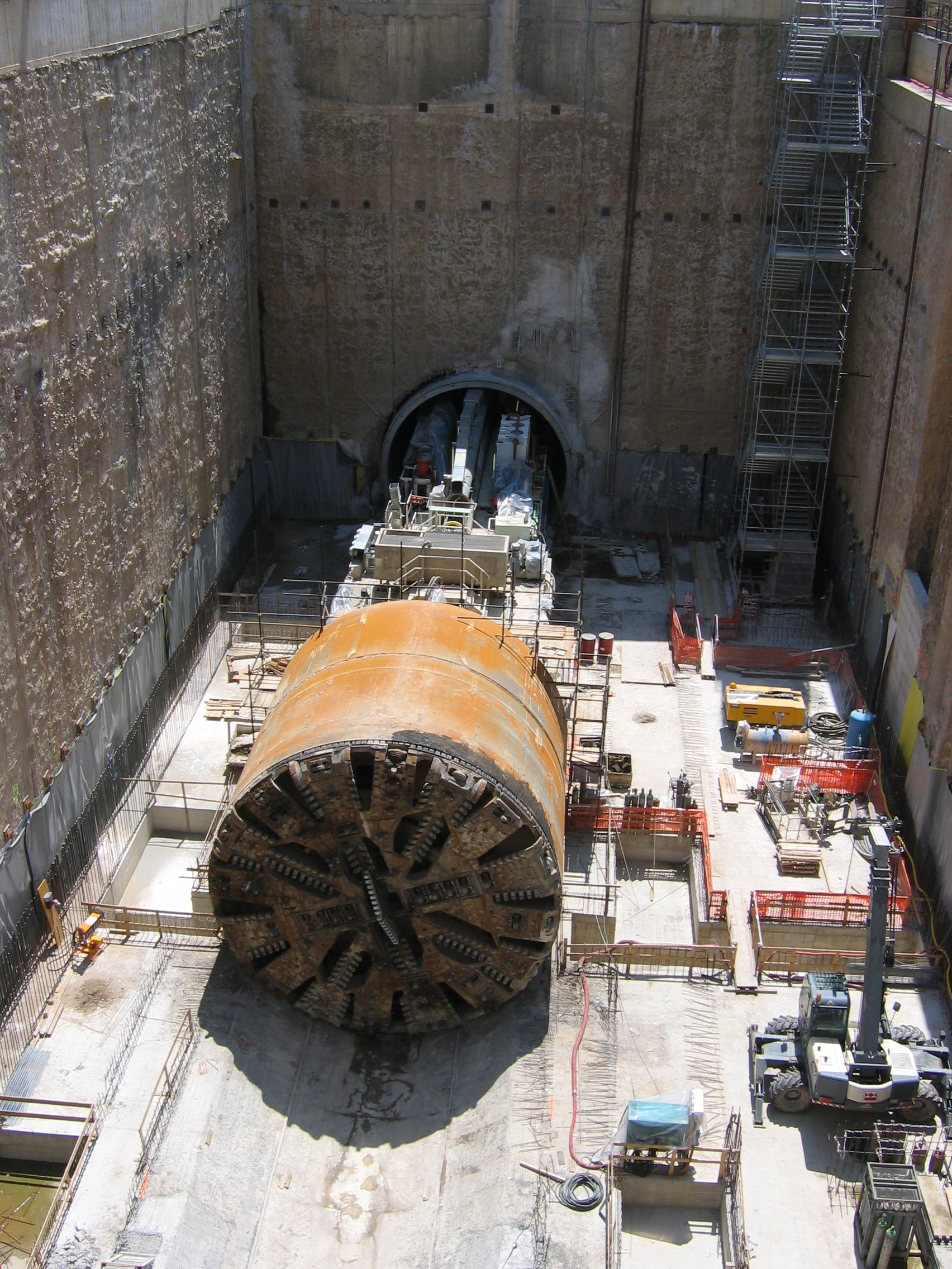 Talpa della metro.bs presso la futura stazione di Brescia Due. Brescia, giugno 2007.